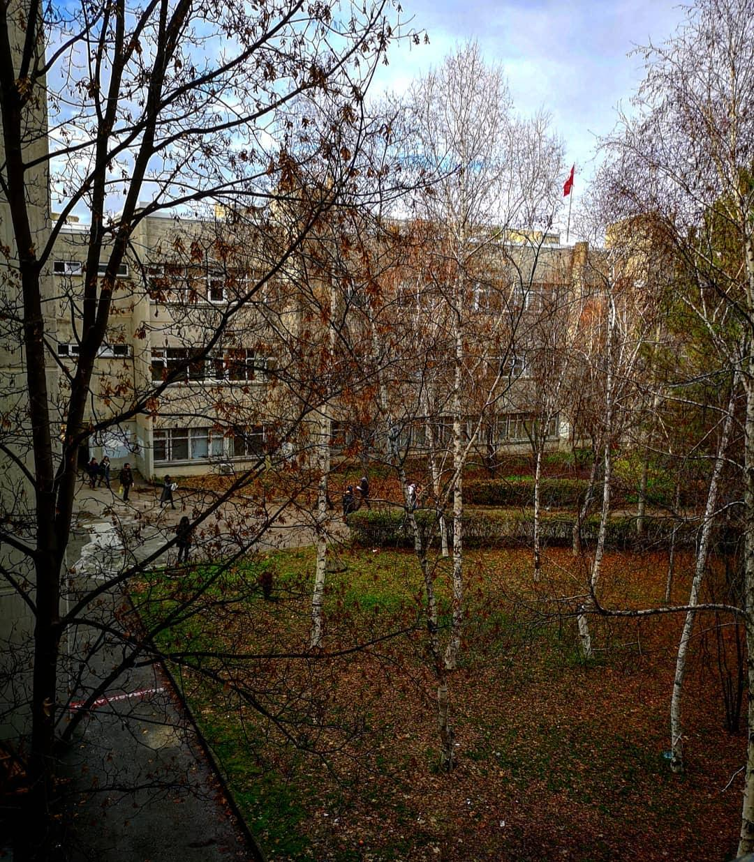 Hacettepe Üniversitesi Beytepe Kampüsü